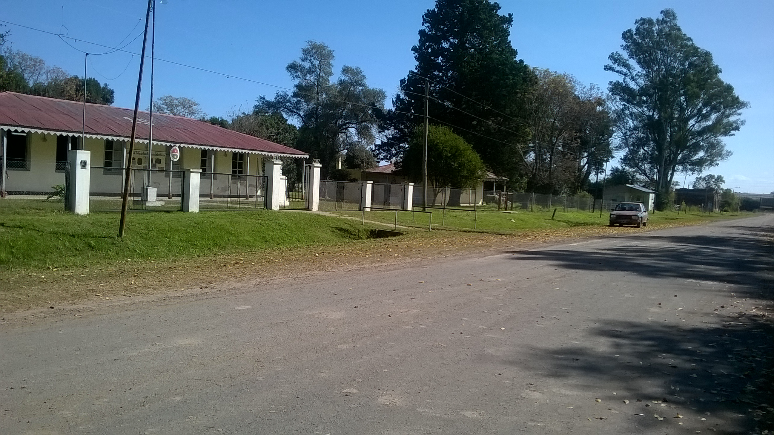 Frente de la Escuela Secundaria Nº 9, en el distrito Antelo. Victoria Entre Ríos